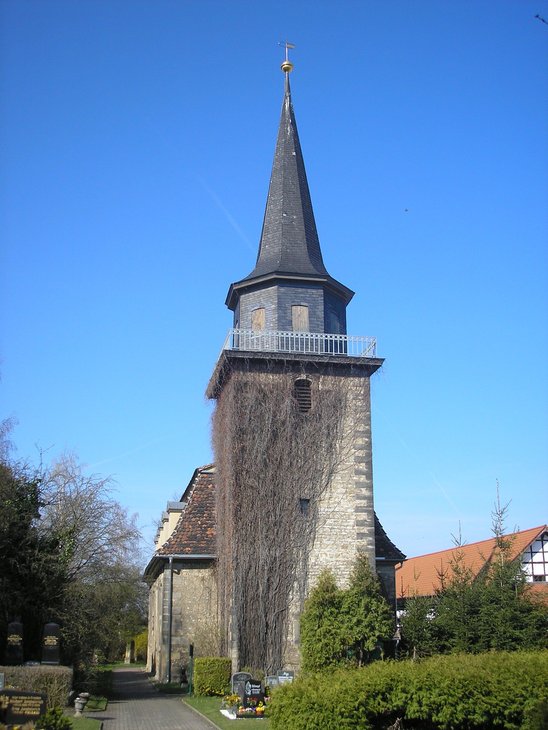 Die Kirche in Azmannsdorf bei Erfurt.